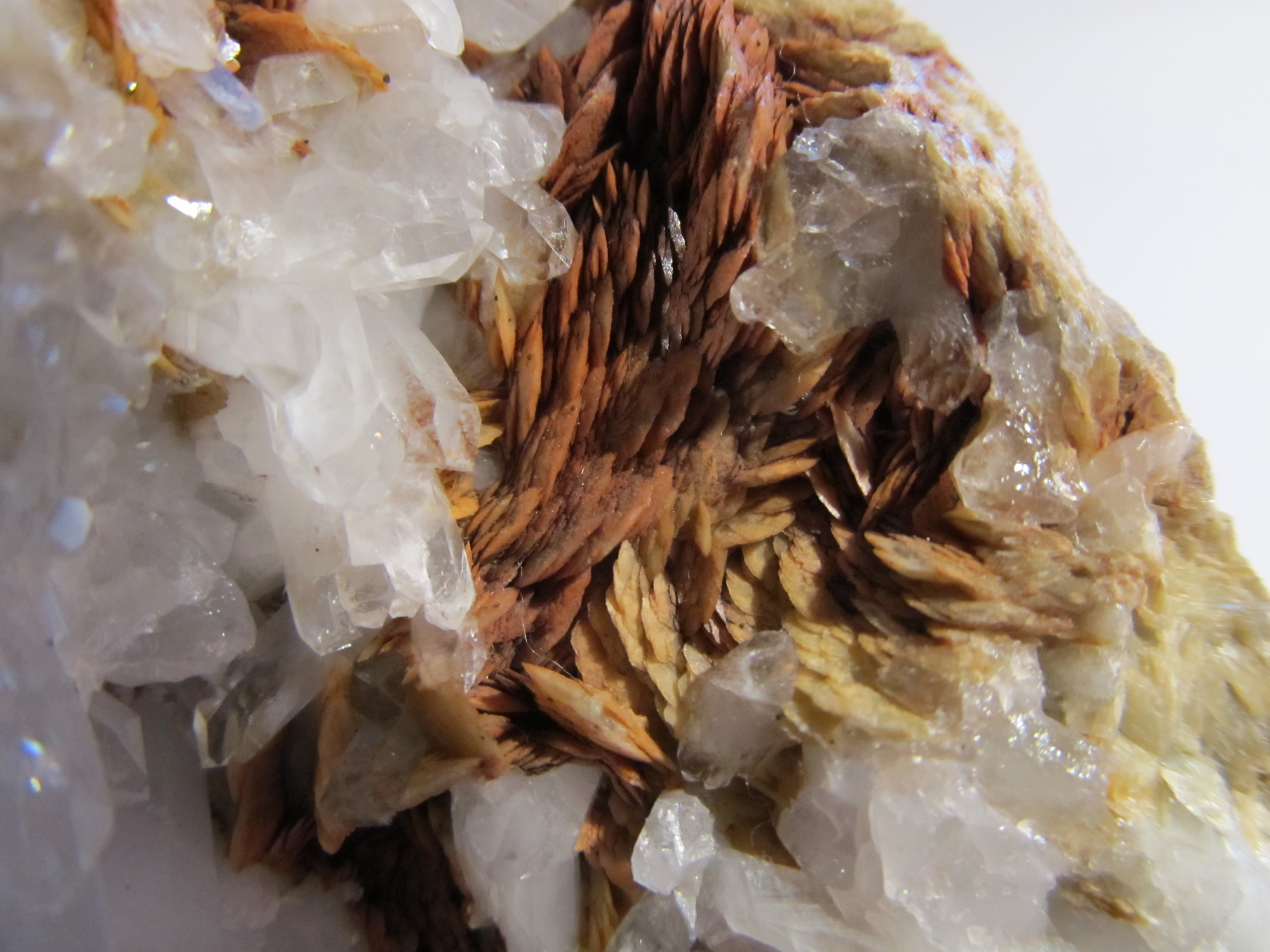 Bergkristall mit Siderit (Spateisenstein) Grube Pfannenberger Einigkeit bei Salchendorf im Siegerland.